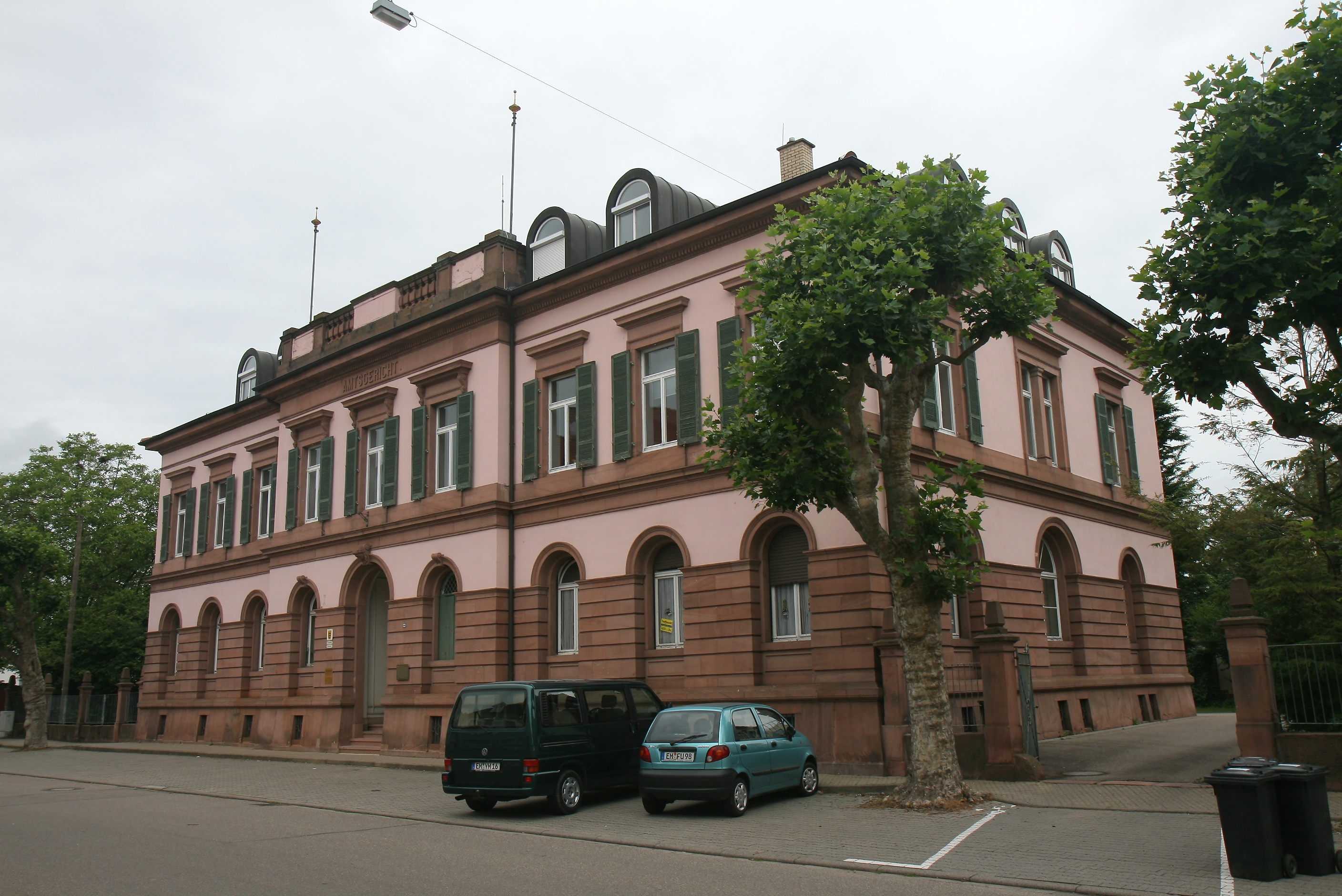 Amtsgericht Kenzingen, Eisenbahnstraße 22 in Kenzingen.